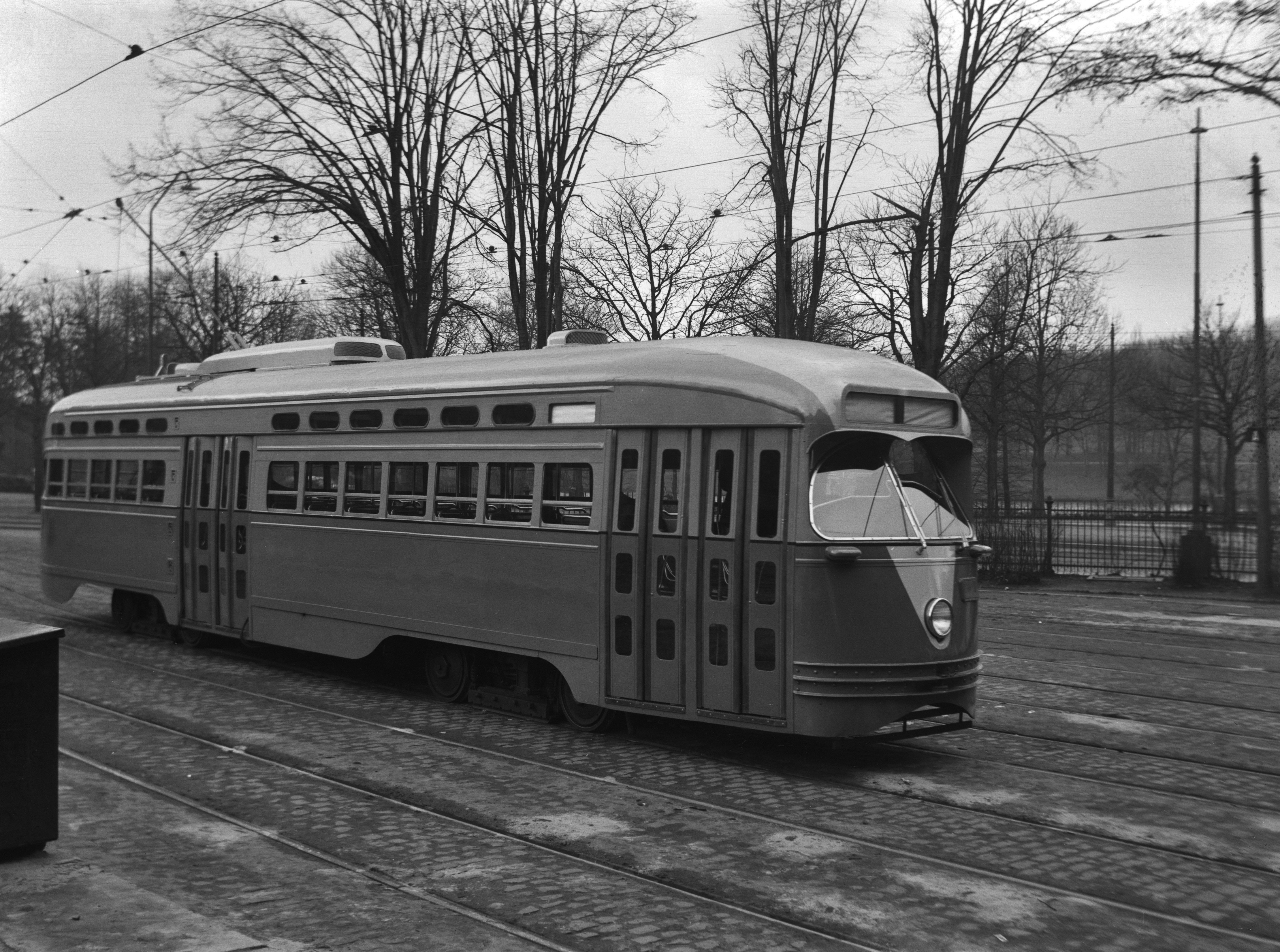 Collectie / Archief : Fotocollectie Anefo Reportage / Serie : [ onbekend ] Beschrijving : Geimporteerde Amerikaanse PCC tram in Brussel voor proefritten op de tramlijn naar Tervuren. Is later op metersporige draaistellen gezet en heeft voor de NMBS gereden. NVBS beeldbank, zie 6de foto) Datum : 31 januari 1948 Locatie : Brussels, stelplaats Woluwe Trefwoorden : interieurs, openbaar vervoer, trams Fotograaf : Fotograaf Onbekend / Anefo Auteursrechthebbende : Nationaal Archief Materiaalsoort : Negatief (zwart/wit) Nummer archiefinventaris : bekijk toegang 2.24.01.04 Bestanddeelnummer : 902-5659